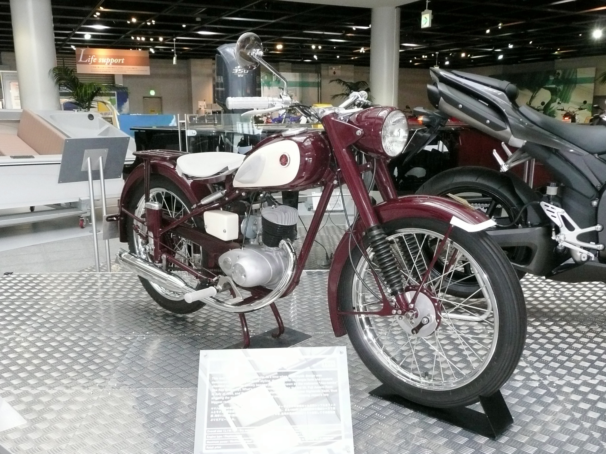 ヤマハ・YA-1 ヤマハコミュニケーションプラザにて撮影